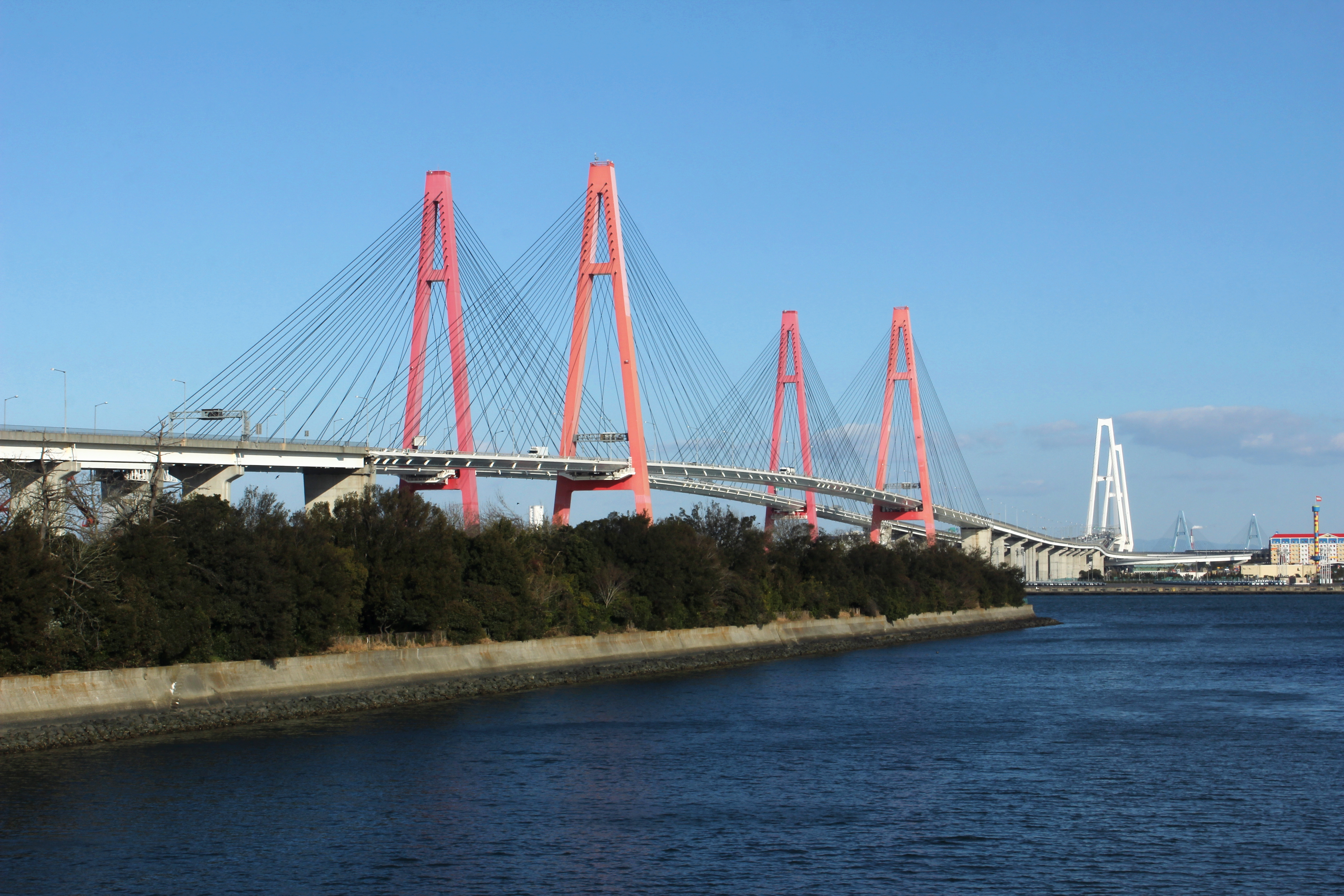 名港トリトン 飛島ふ頭付近から撮影